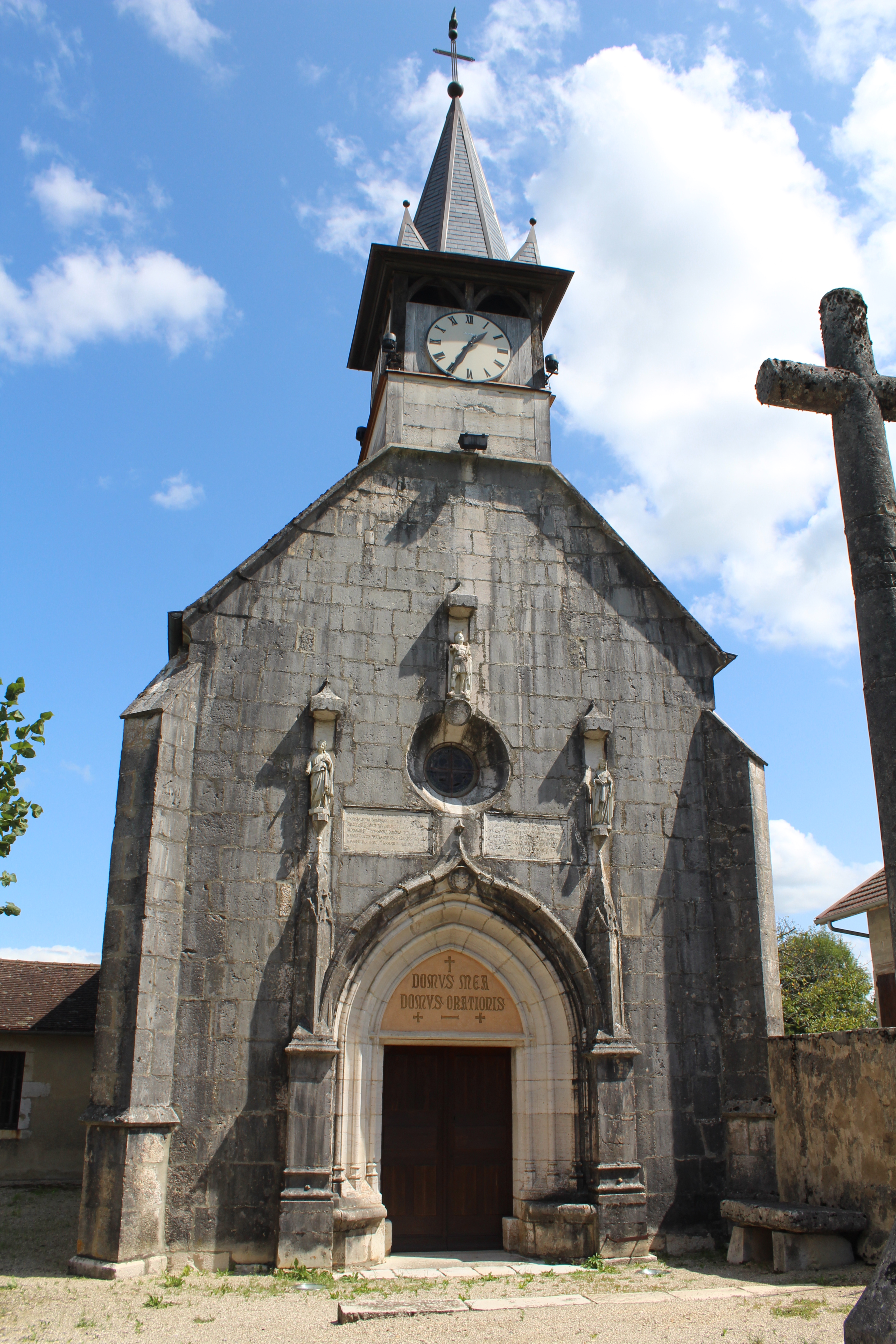 Église Saint-Maurice de Flaxieu.